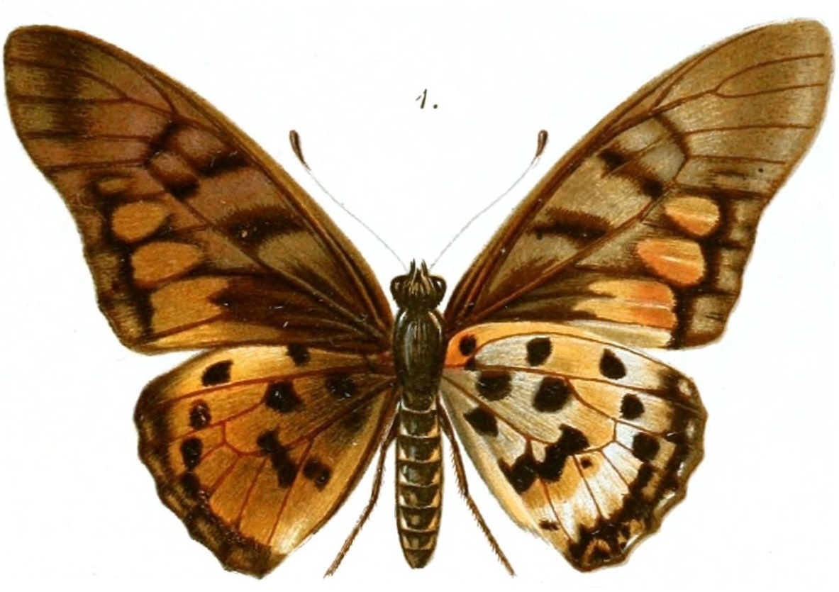 Rogenhofer, A.F. (1890). Afrikanische Schmetterlinge des kaiserlich-königlichen Naturhistorischen Hofmuseums – Taf. XXIIIAnnalen des (K.K.) Naturhistorischen Museums. Wien 4:547-554. Tafel 23 Erklärung zu Tafel XXIII. Fig. 1. Papilio Ridleyanus White. ♀. = Graphium ridleyanus (White, 1843), ♀ A. Rogenhofer, Afric. Schmetterl. d.k.k. Hofmuseums – Taf. XXIII von Schlereth u. Mitis del. – Lith. u. Farbendruck v. Th. Bannwarth. Wien. Annal. d.k.k. Naturhist. Hofmuseums Band IV. 1889. Title: Annalen des Naturhistorischen Museums in Wien Year: 1889 (1880s) Authors: Naturhistorisches Museum (Austria) Subjects: Naturhistorisches Museum (Austria); Natural history Publisher: Wien, Naturhistorisches Museum [etc. ] Text Appearing Before Image: A. Rogenhofer, Afric. Schmetterl. d.k.k. Hofmuseums – Taf. XXIII Text Appearing After Image: von Schlereth u. Mitis del. – Lith. u. Farbendruck v. Th. Bannwarth. Wien. Annal. d.k.k. Naturhist. Hofmuseums Band IV. 1889.